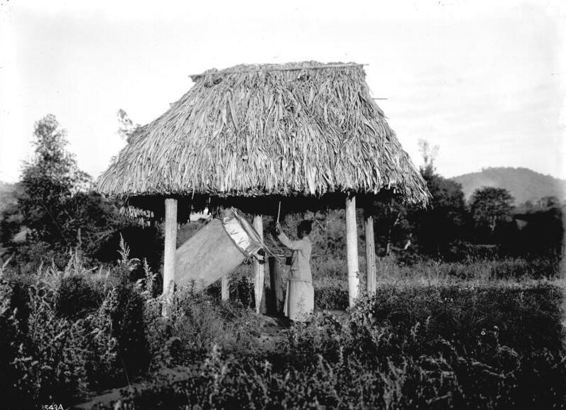 Ngoma-Schlagen